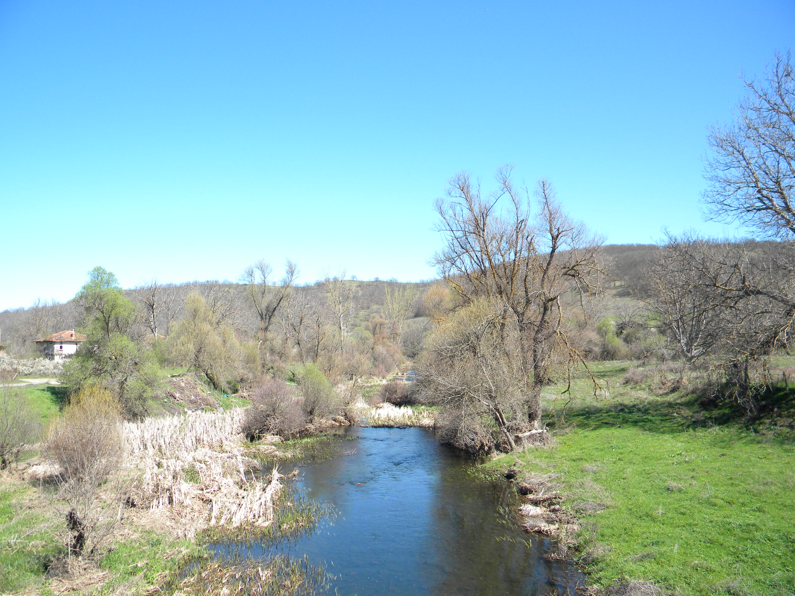 Факийска река